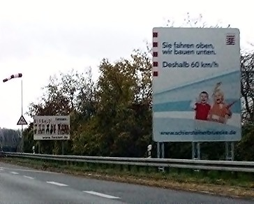 Schiersteiner Brücke